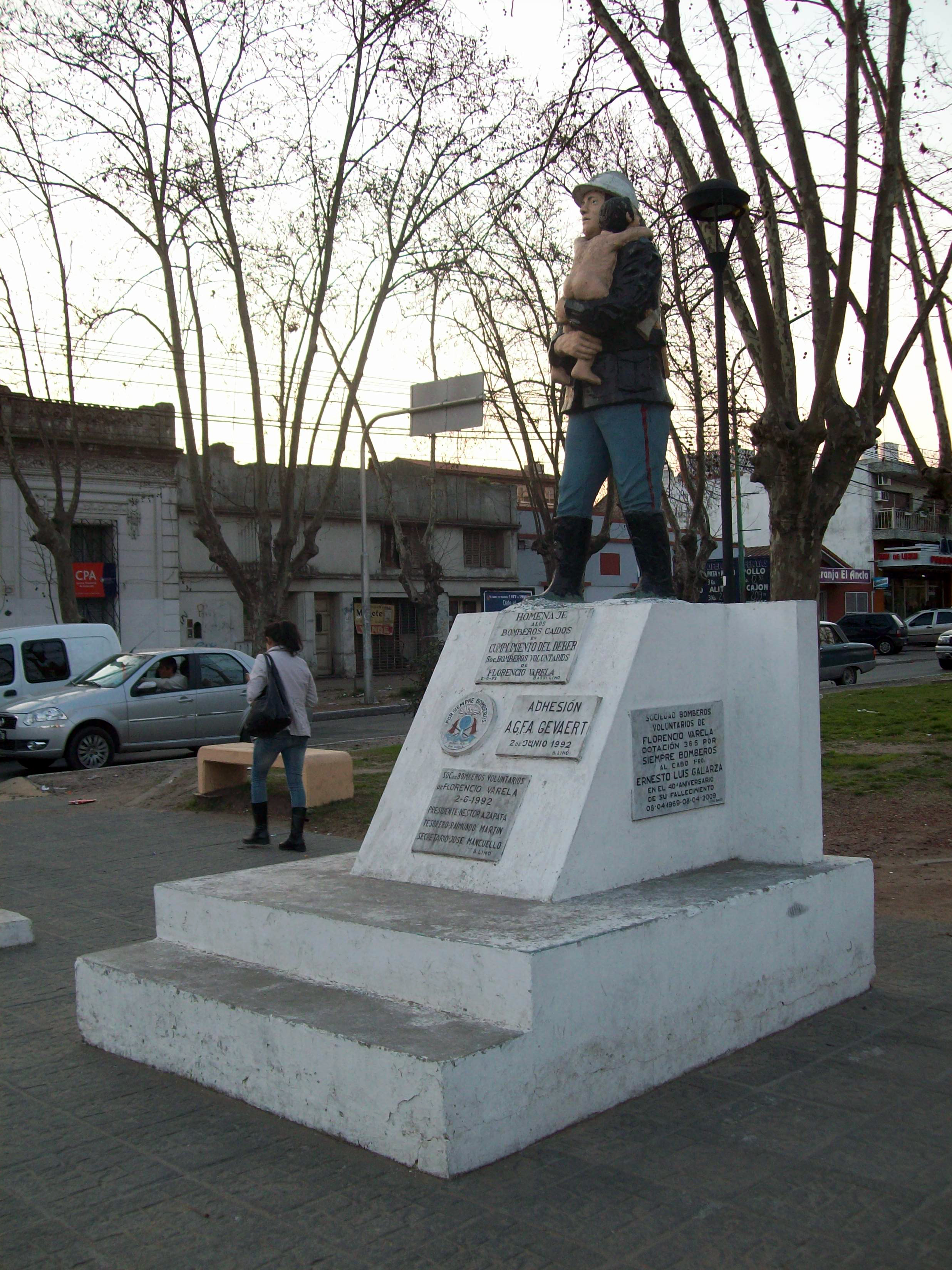 Homenaje a los bomberos voluntarios en cumplimiento del deber.